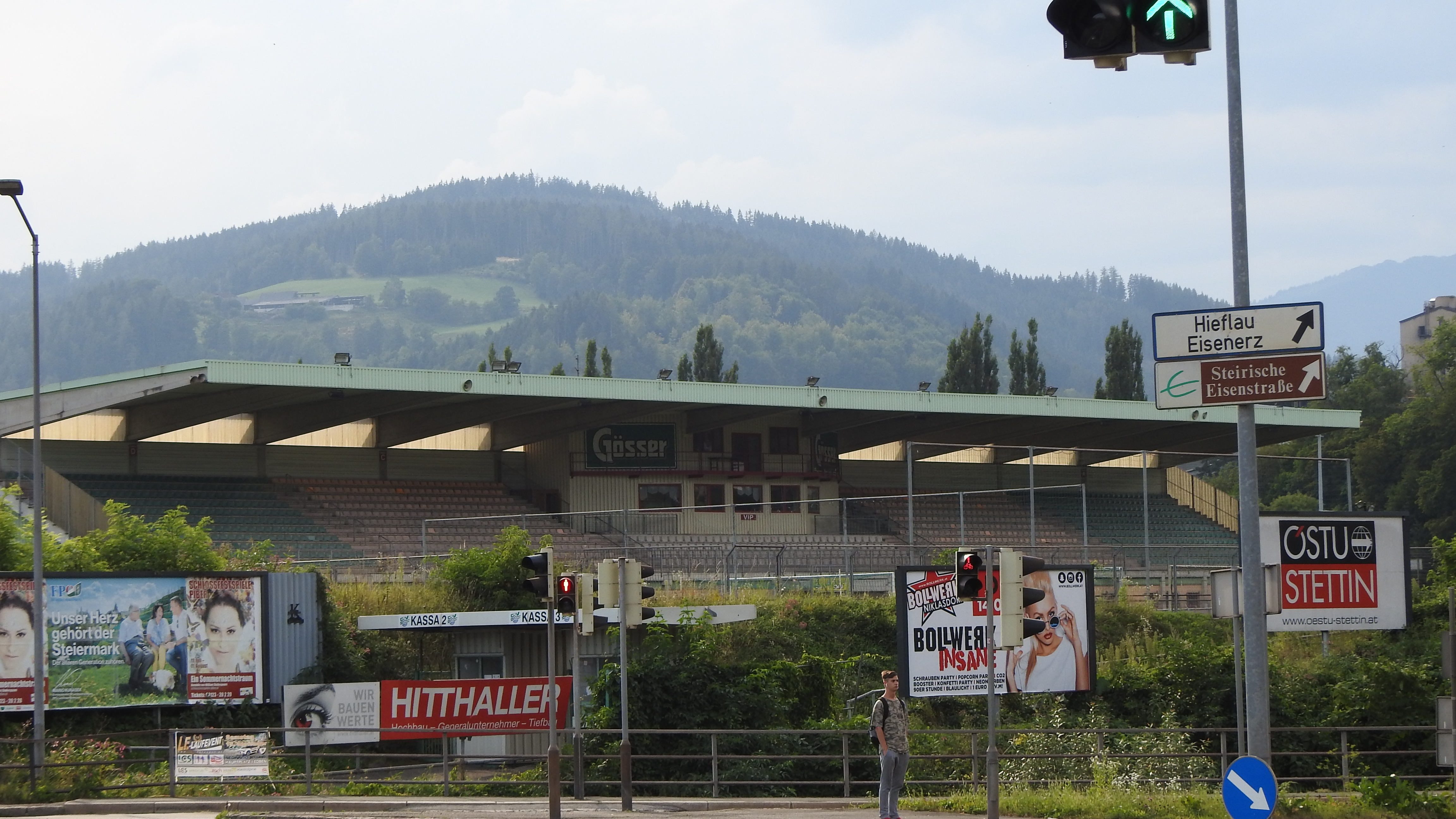 Zuschauertribüne des DSV-Stadions, Leoben-Donawitz. Nord/Ost-Ansicht